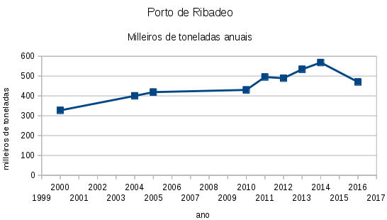 Movemento anual de mercadorías no porto de Ribadeo